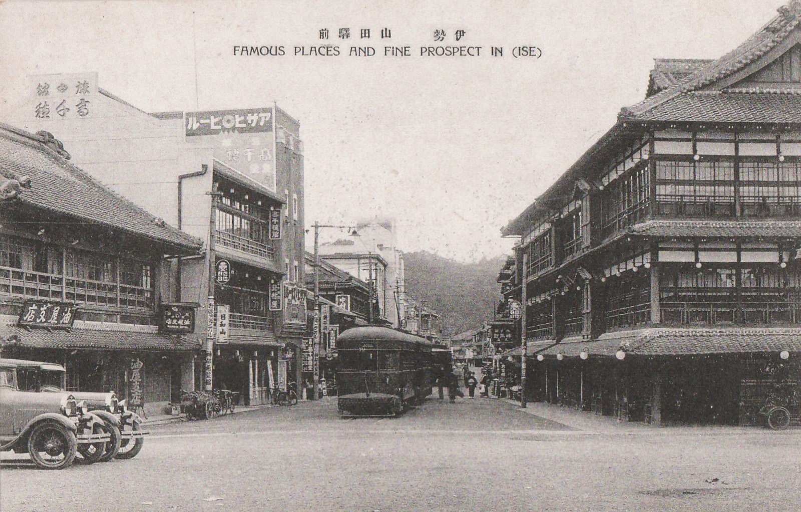 山田（現：伊勢市）駅前と神都線電車。右が「宇仁館」で左は「油屋支店」